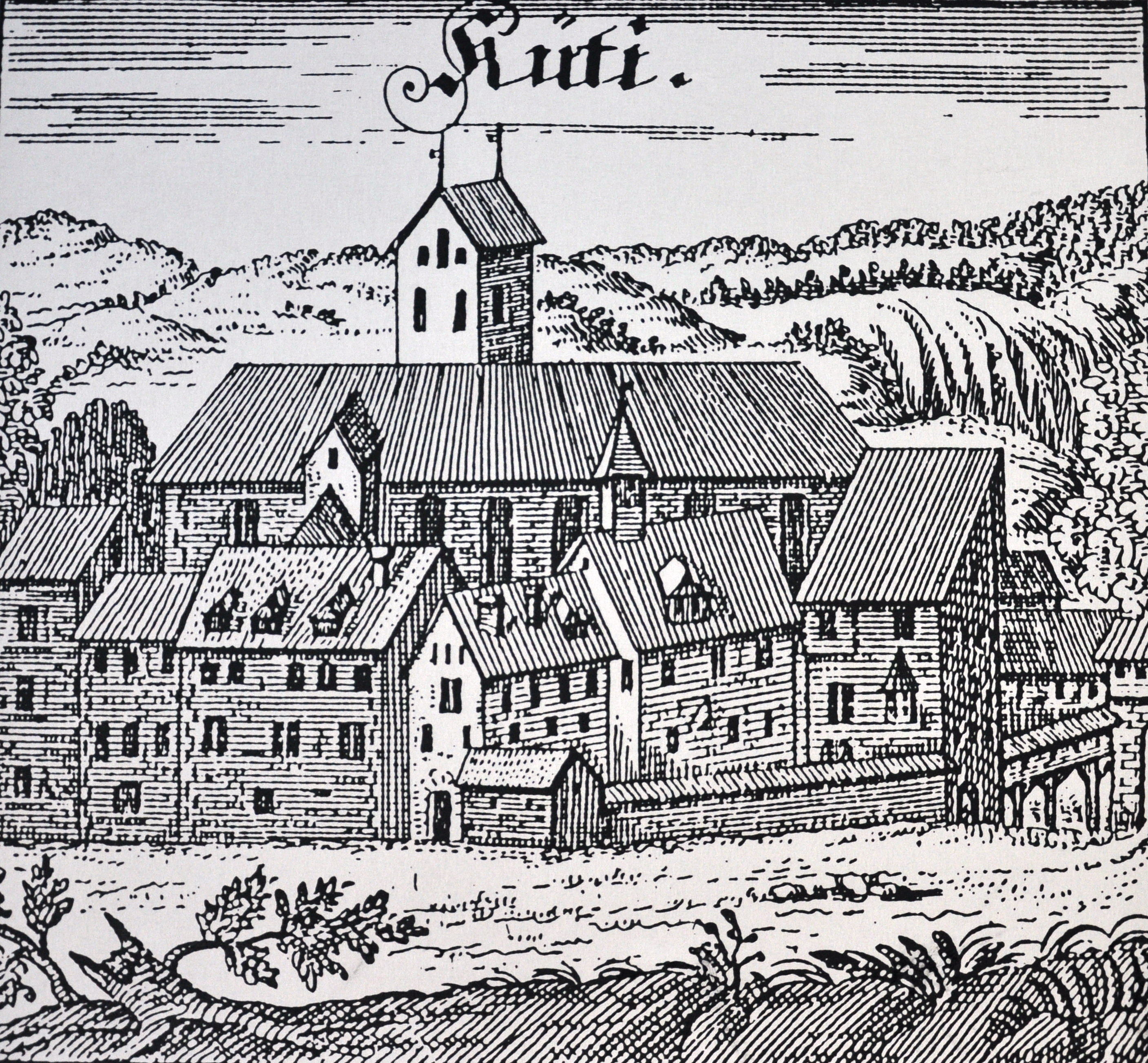 Rüti (ZH) : Kloster Rüti, Stich ([Frage: Holzschnitt?]) von Melchior Füssli, um 1700